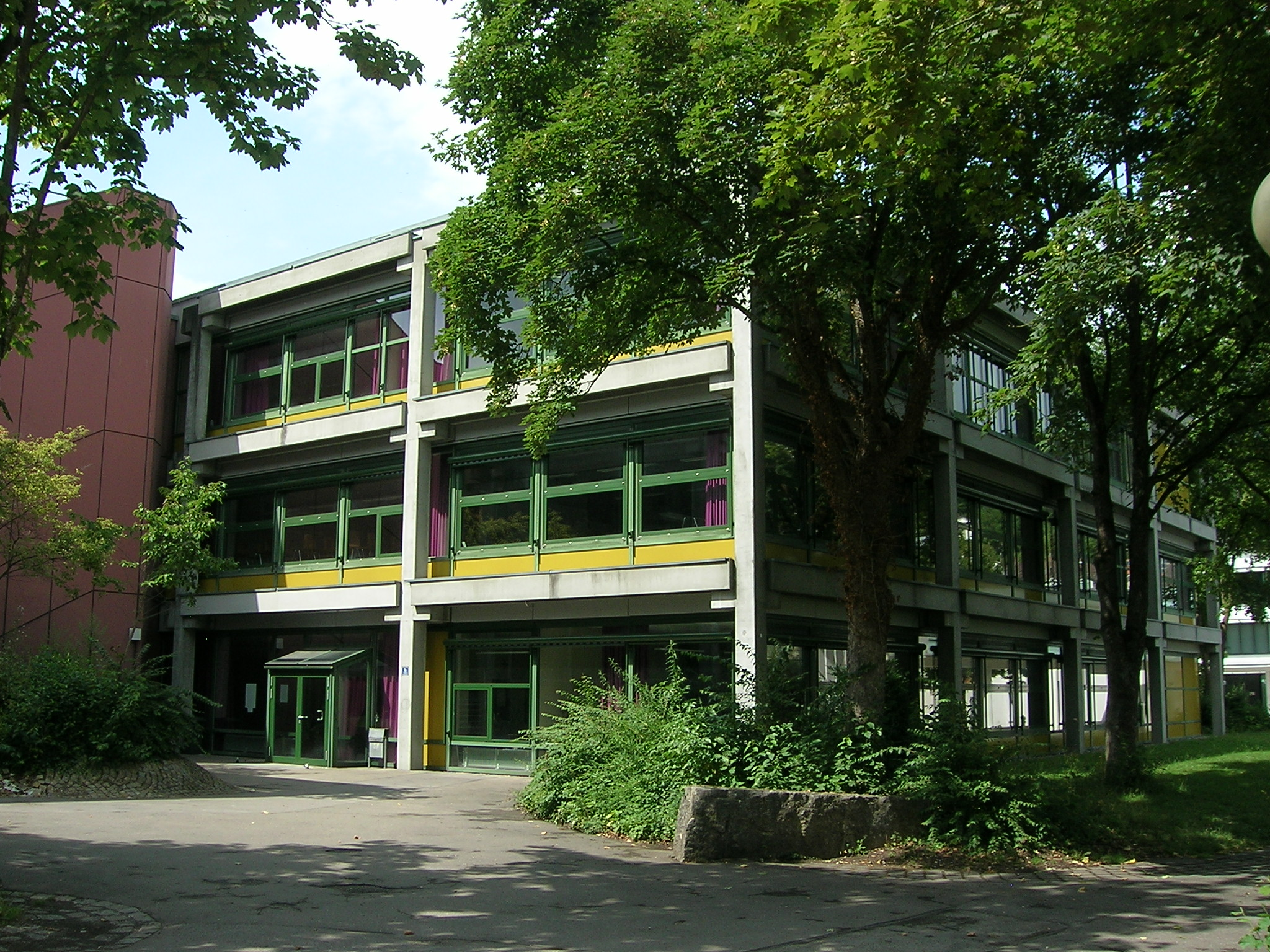 Schottenau 16 Eichstätt: Willibald-Gymnasium im Schulzentrum Eichstätt-Schottenau.